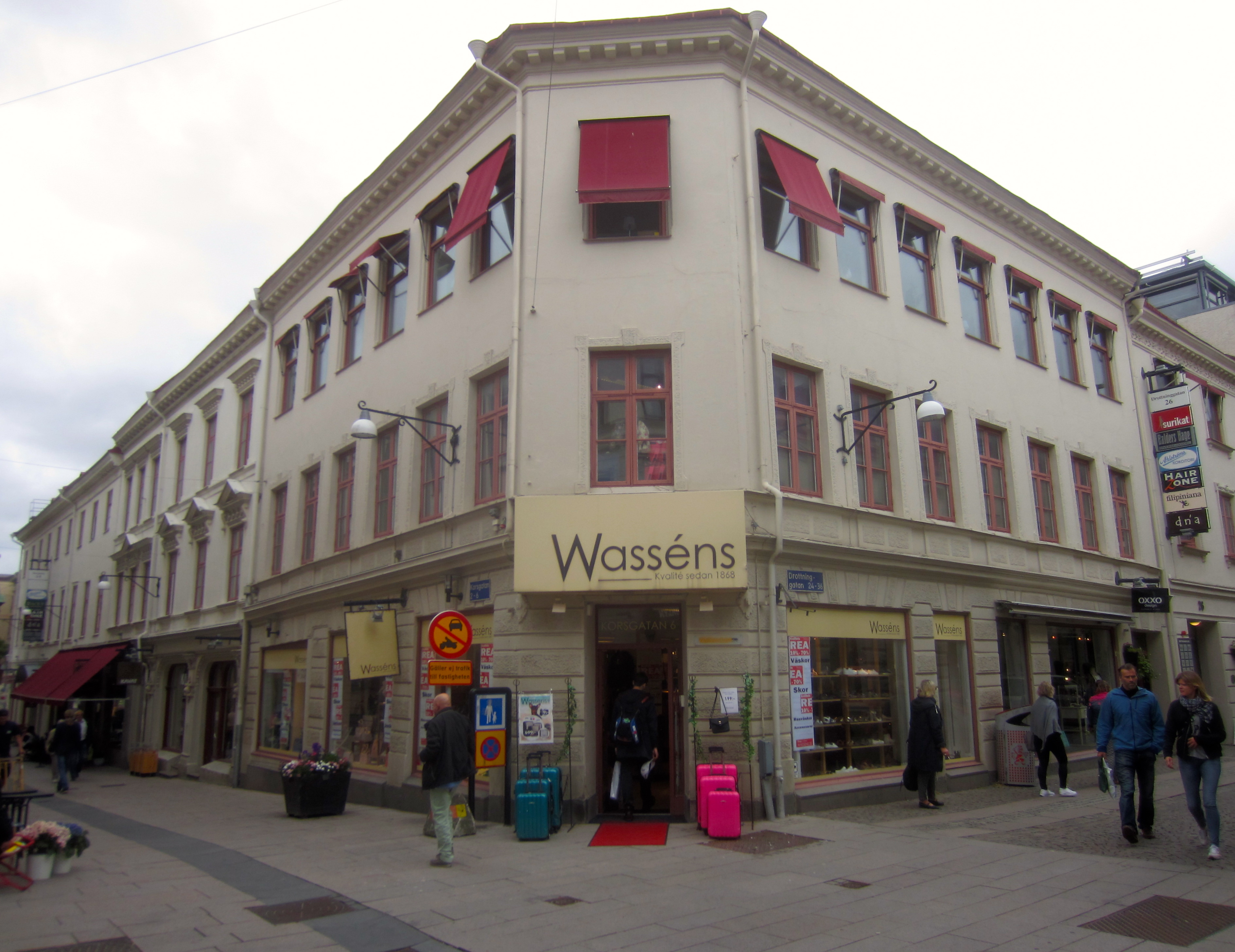 Åkermanska huset vid Korsgatan 6 och Drottninggatan 24 i Göteborg.